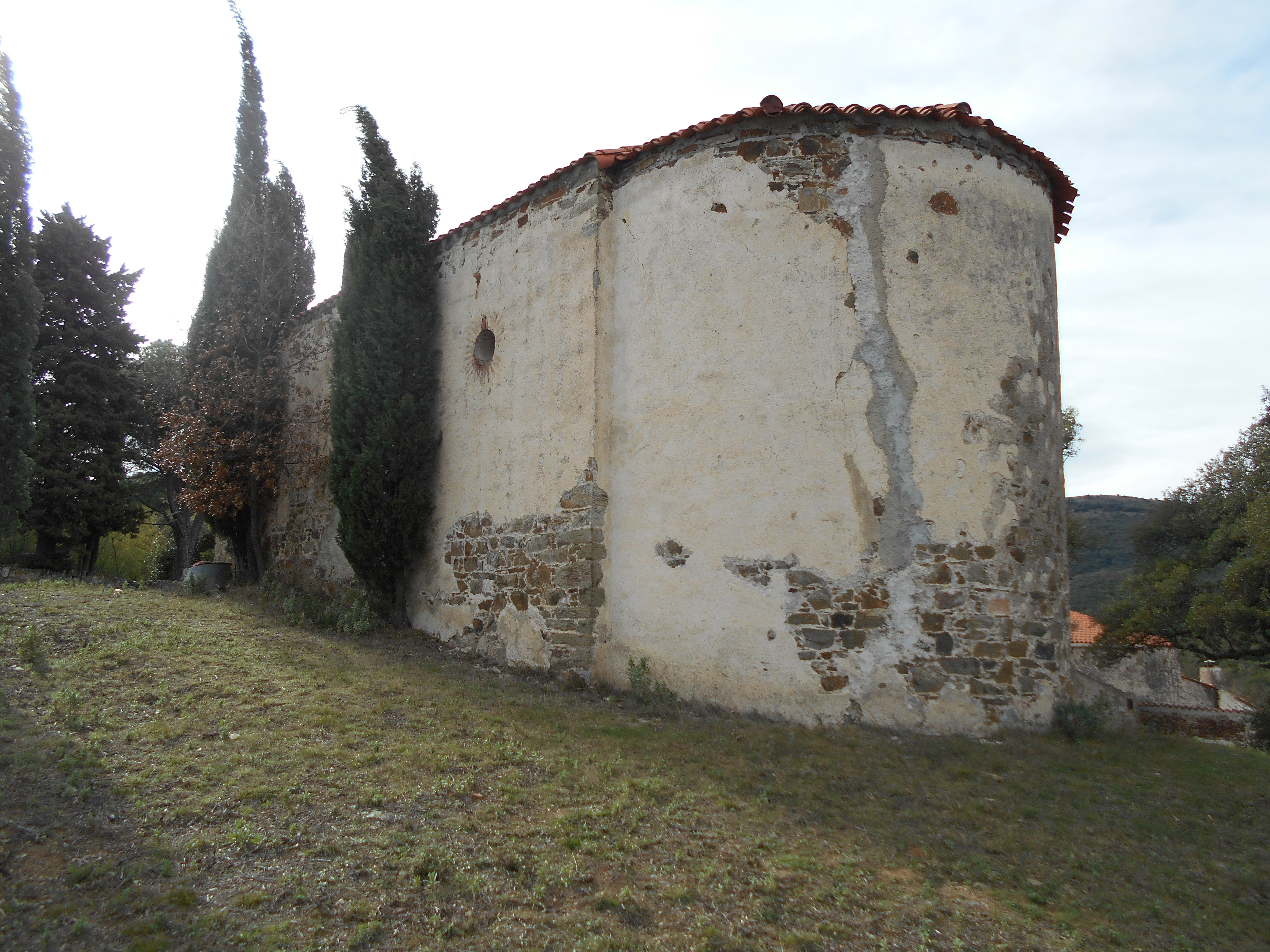 Absis de Santa Maria de Montoriol